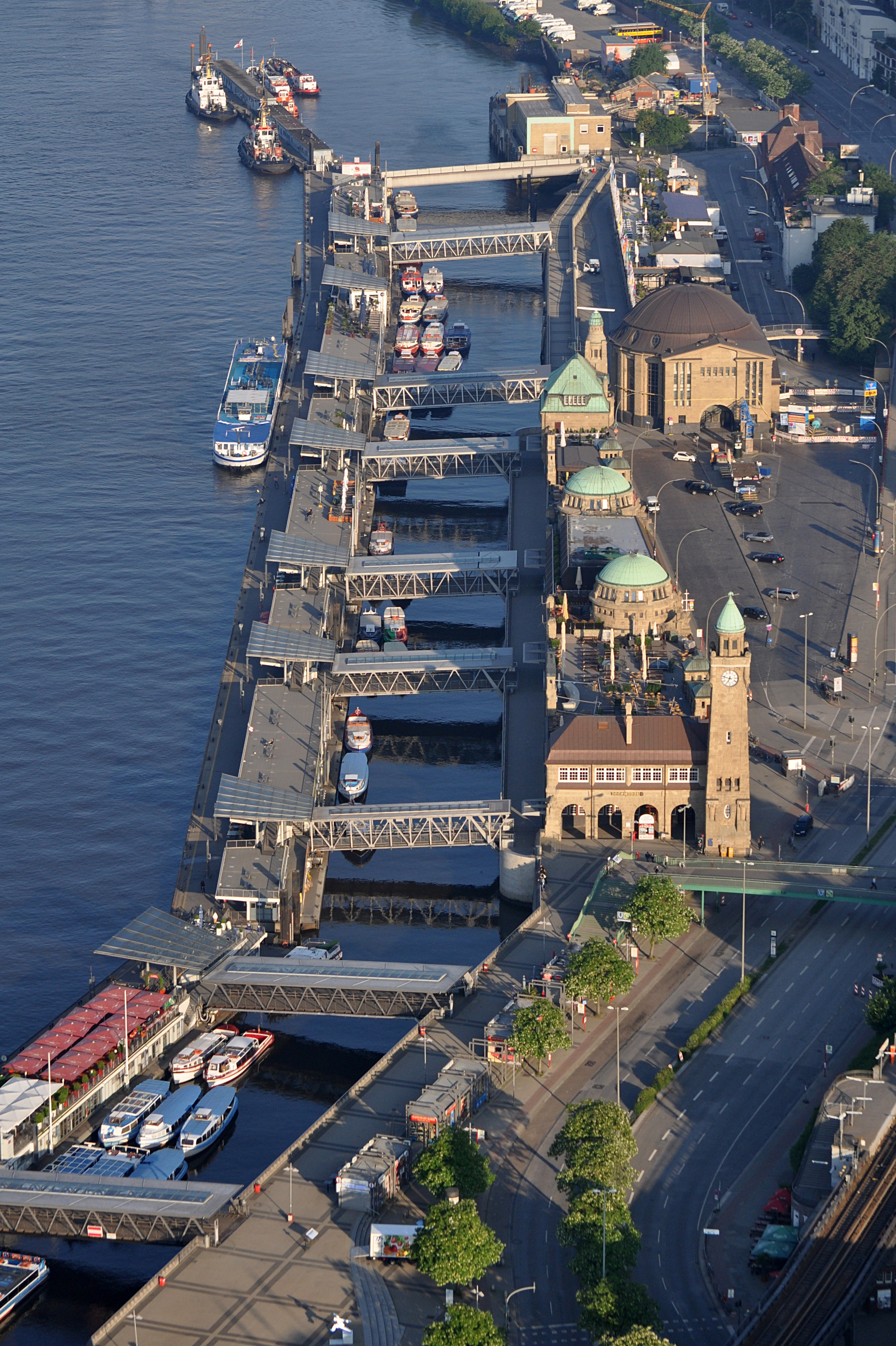 Landungsbrücken in Hamburg-St. Pauli. This is a photograph of an architectural monument. , 12742, 12743, 12744, 12745